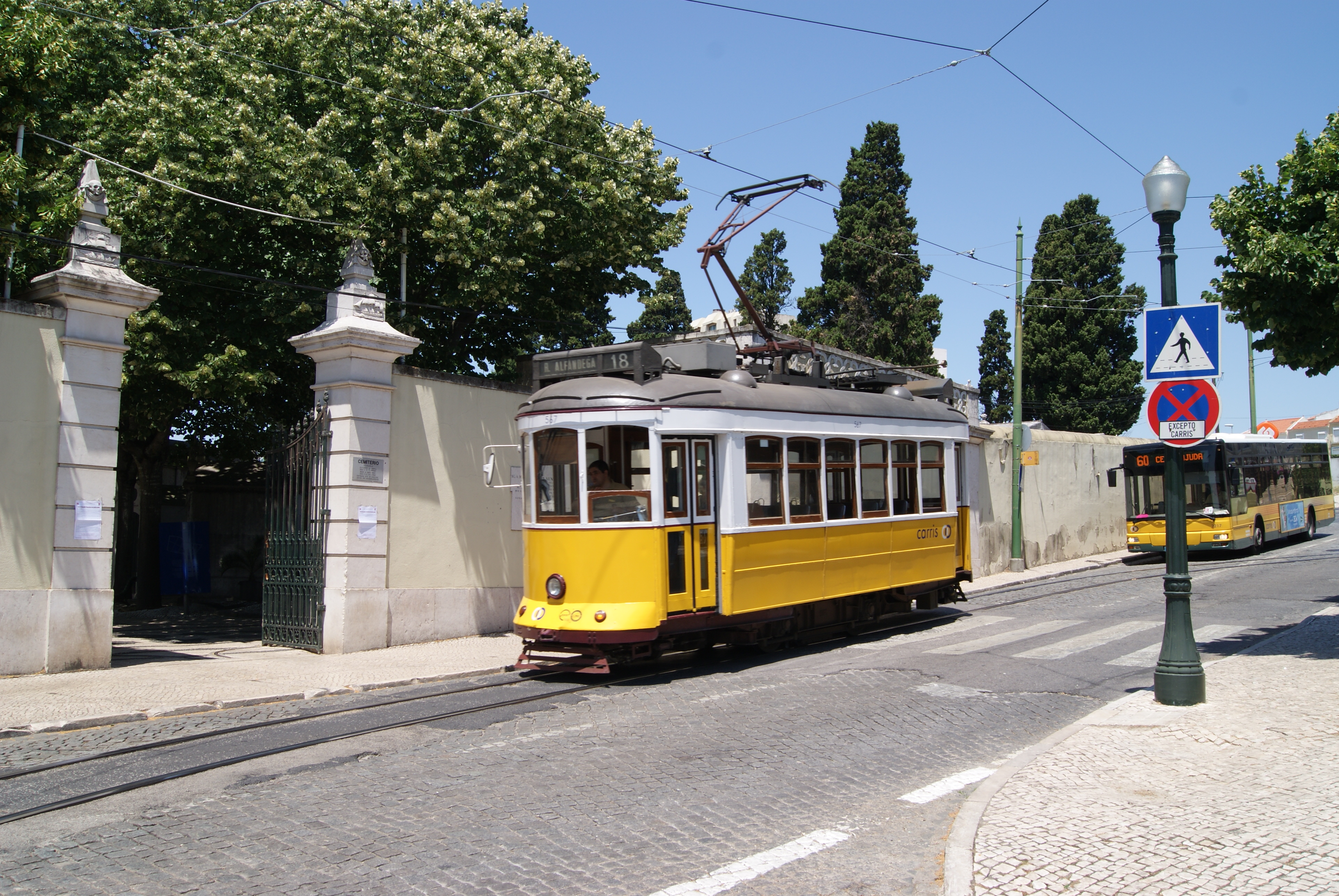 Photo: Trams aux Fils. Ligne 18, direction P. ALFANDEGA Rua das Açucenas Tram 567 ancien tram 281 de la série 203-282 A Ajuda, il est plus facile de faire des photos des avions qui passent dans le ciel que des trams ils y en a plus souvent, un avion toute les trois minutes, contre un tram toute les vingt minutes.